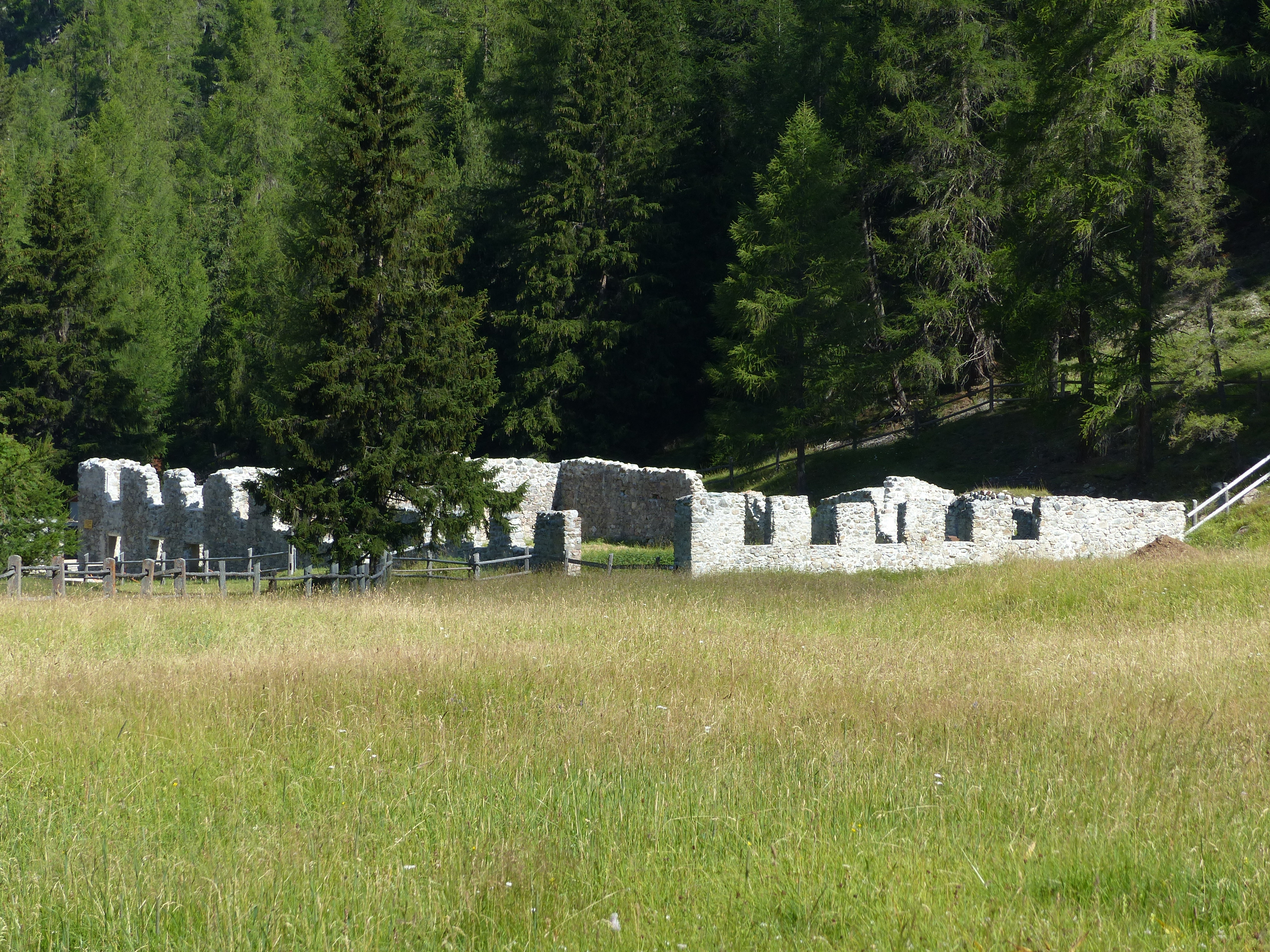 Ruine Untermadlain der Schmelzra in S-charl: Verhüttet wurden Blei und Silber